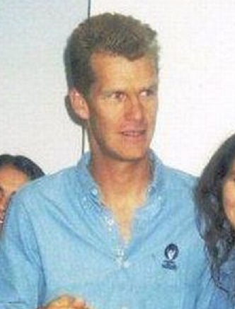 O iatista brasileiro Robert Scheidt, campeão olímpico, em evento esportivo na Sociedade Amigos da Praia do Cassino, Rio Grande, RS. Autor da foto original: Mário Antunes Teixeira ,trabalho derivado com permissão do autor por luferom